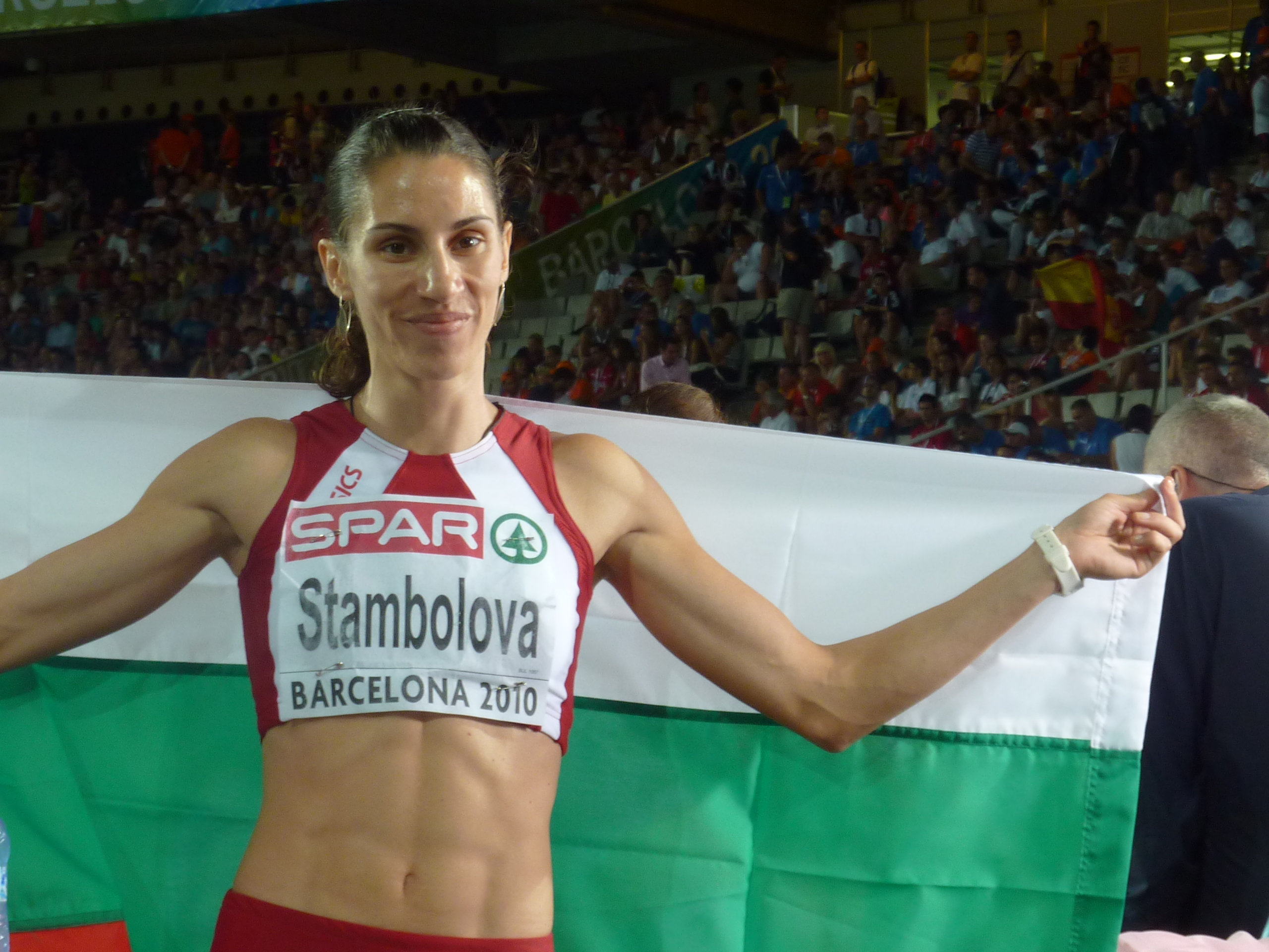 Vania Stambolova